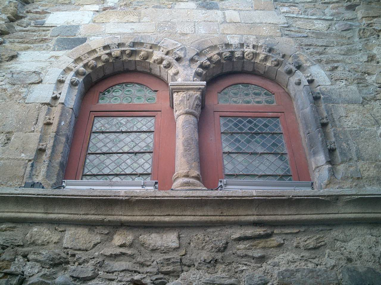 Fenetre romaine située à Blesle